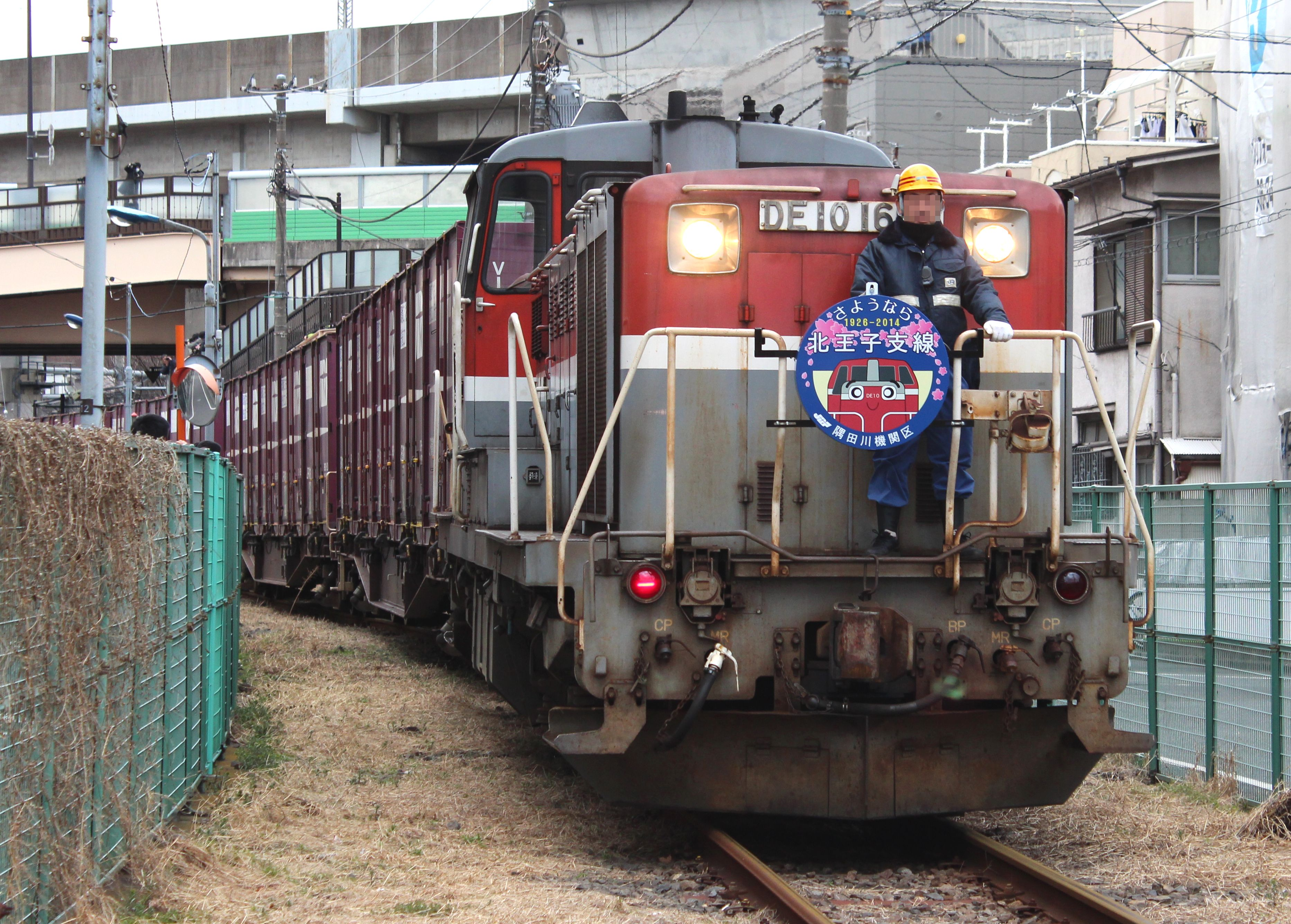 東北本線貨物支線（北王子線）を走るDE10形ディーゼル機関車